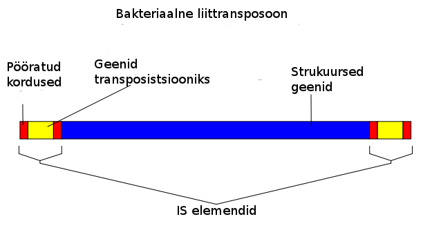 Joonisel on näha bakteriaalset liittransposooni, kus keskel on lisageene kodeeriv ala ja otstes IS elemendid.